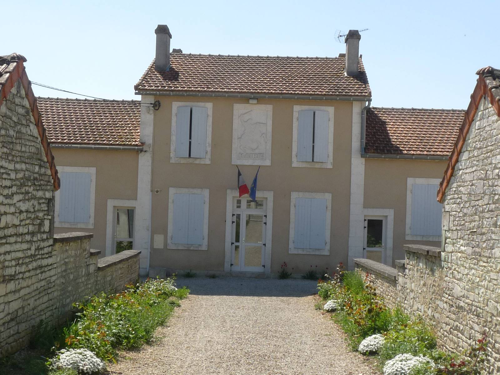 Mairie de Ligné, Charente, France